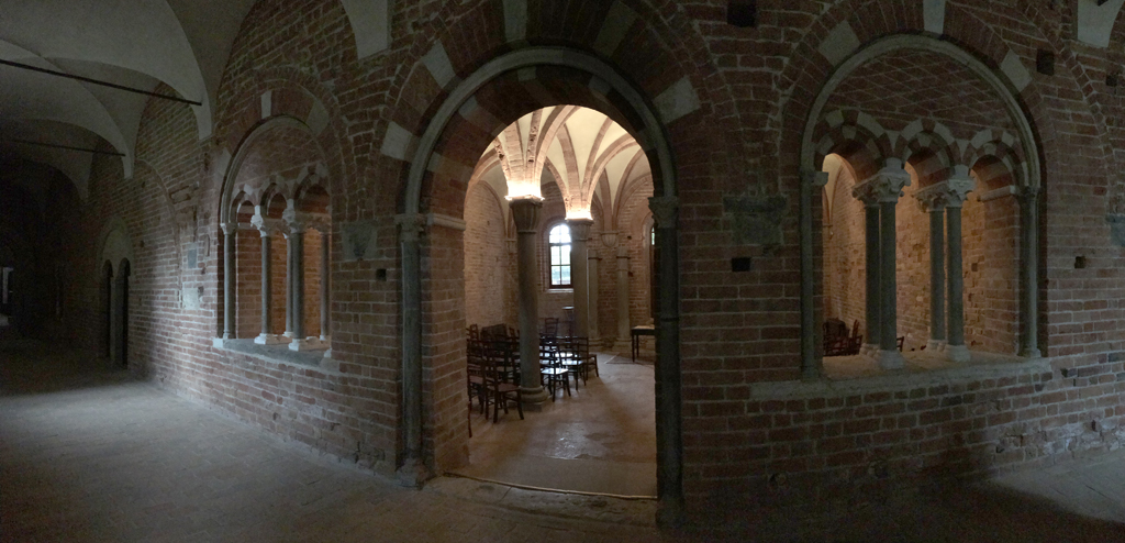 Panoramica della sala capitolare all'interno dell'abbazia di Santa Maria di Rivalta Scrivia